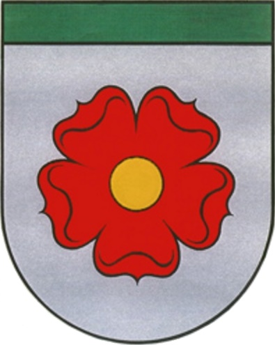 Bereits in der ersten Hälfte des 13. Jahrhunderts hatte das Geschlecht der Hagegker hatte eine Burg und ein Dorf in St. Stefan errichtet. Die Rose dürfte schon zu dieser Zeit im Wappen dieses Geschlechts als Symbol für diese Landschaft und für St. Stefan gewählt worden sein. Die Rose spielte schon im Mittelalter eine bedeutsame Rolle. Der Weingartennamen Rösenlein ist bereits für die Zeit um 1400 nachgewiesen. Im Siegel Rudolfs II. von Hagegk ist das Rosenwappen der Hagegker mit der fünfblättrigen Rose in einer Originalurkunde aus dem Jahre 1390 erhalten. Diese befindet sich heute im Schlossarchiv in Greinburg in Oberösterreich. Anlässlich der Markterhebung 1954 wurde die fünfblättrige Rose zum Wappen der Marktgemeinde St. Stefan im Rosental gewählt.